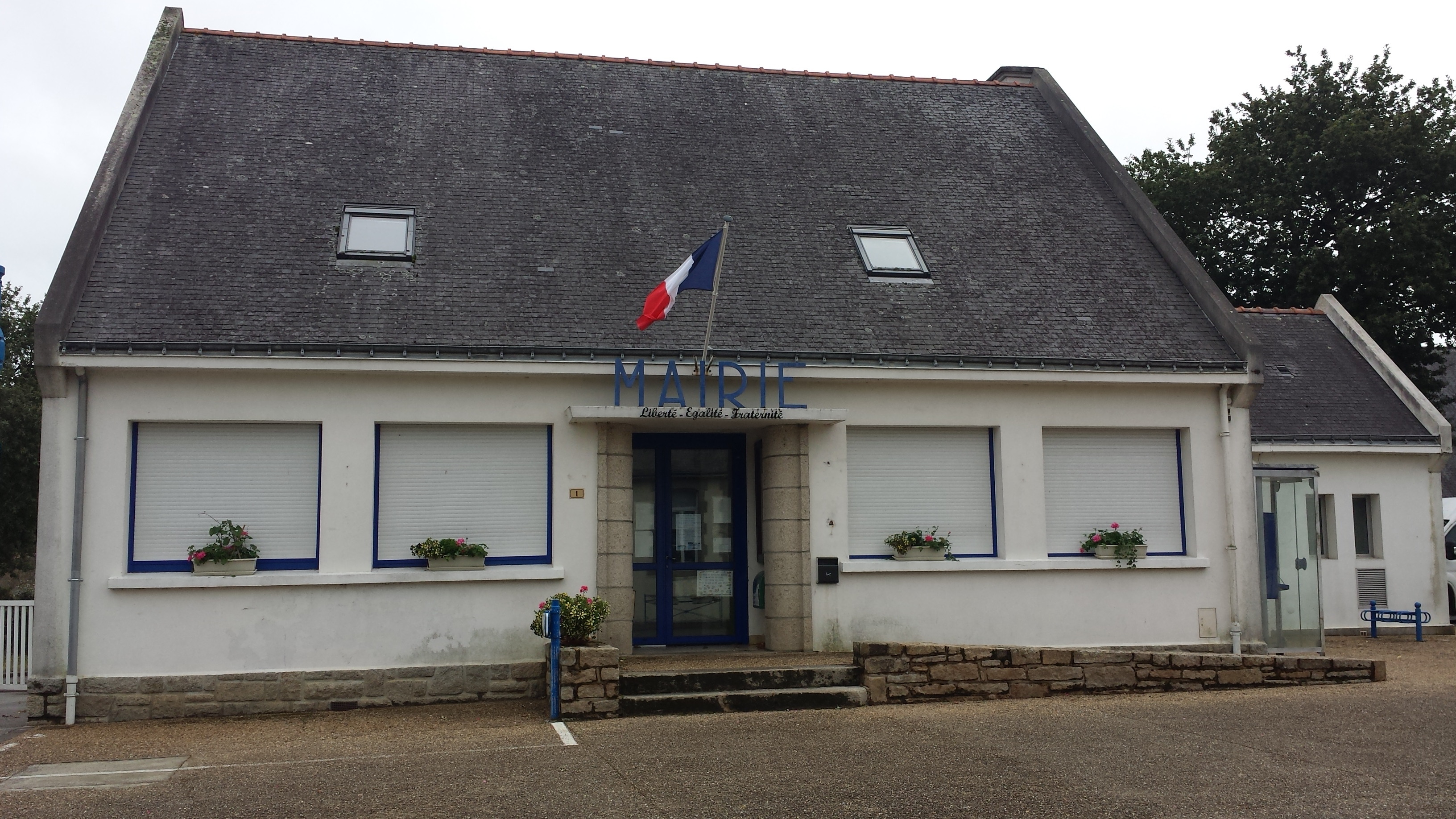 Mairie du Tour du Parc - Presqu'Île de Rhuys - Morbihan (56) - Bretagne - France